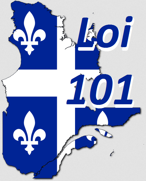 Charte de la langue française communément appelée “loi 101”.